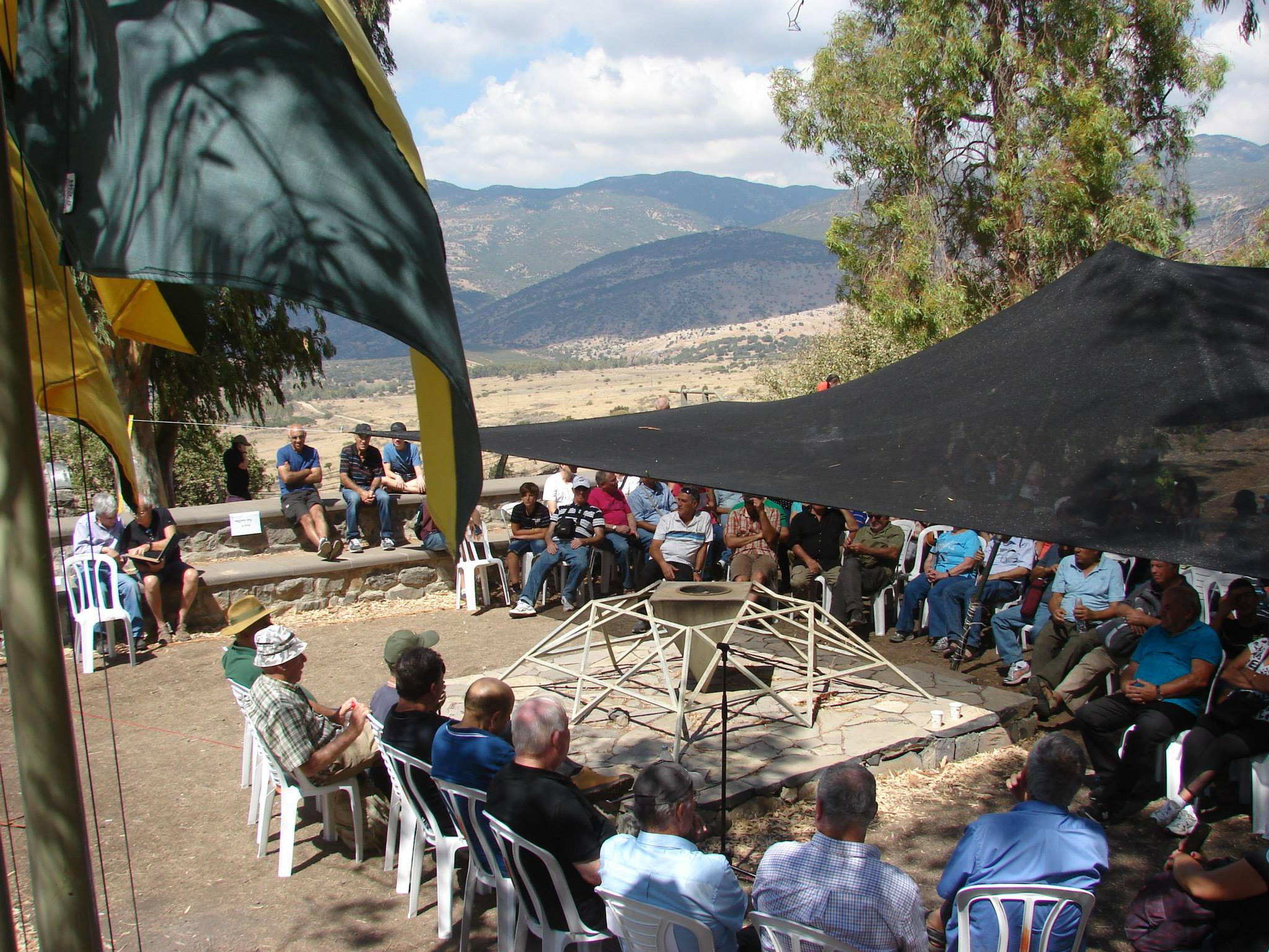 מפגש של הלוחמים בקרב, ספטמבר 2014. נראים בגבם, מימין לשמאל: ורדי (בכובע), שמיל, זמיר, חמאווי, ביזר, פרידמן, דוד כהן